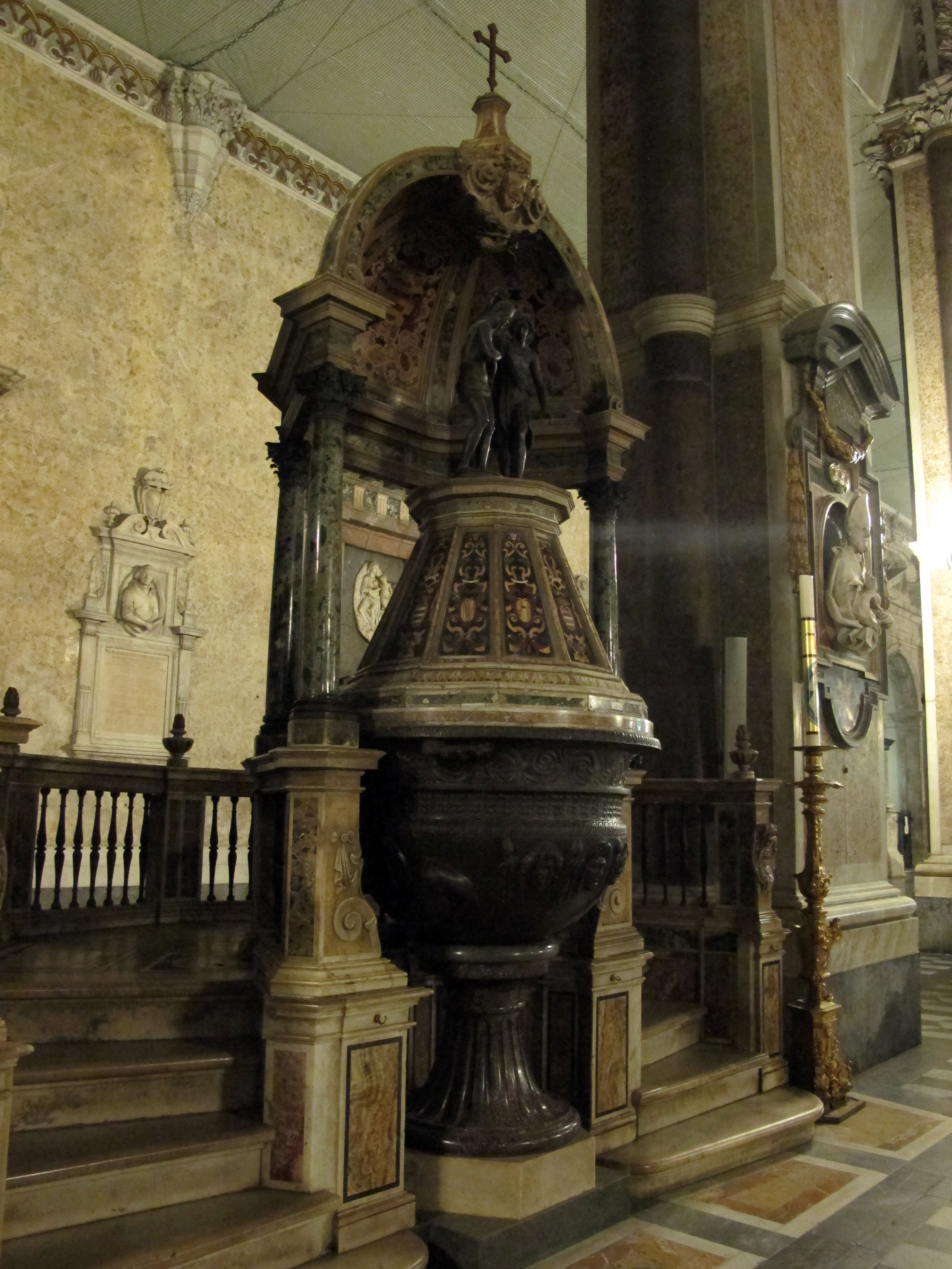 Duomo di Napoli